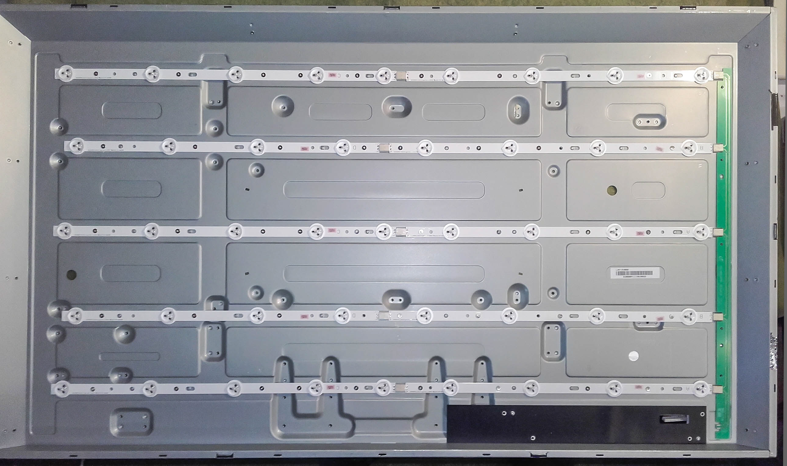 LED-Streifen in einem 40-Zoll-TV (Produktionsstand 2016)